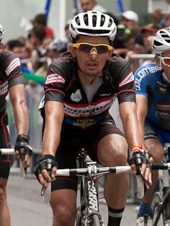 Julián Rodas en la llegada de la 4ª etapa, Vuelta a Colombia 2012